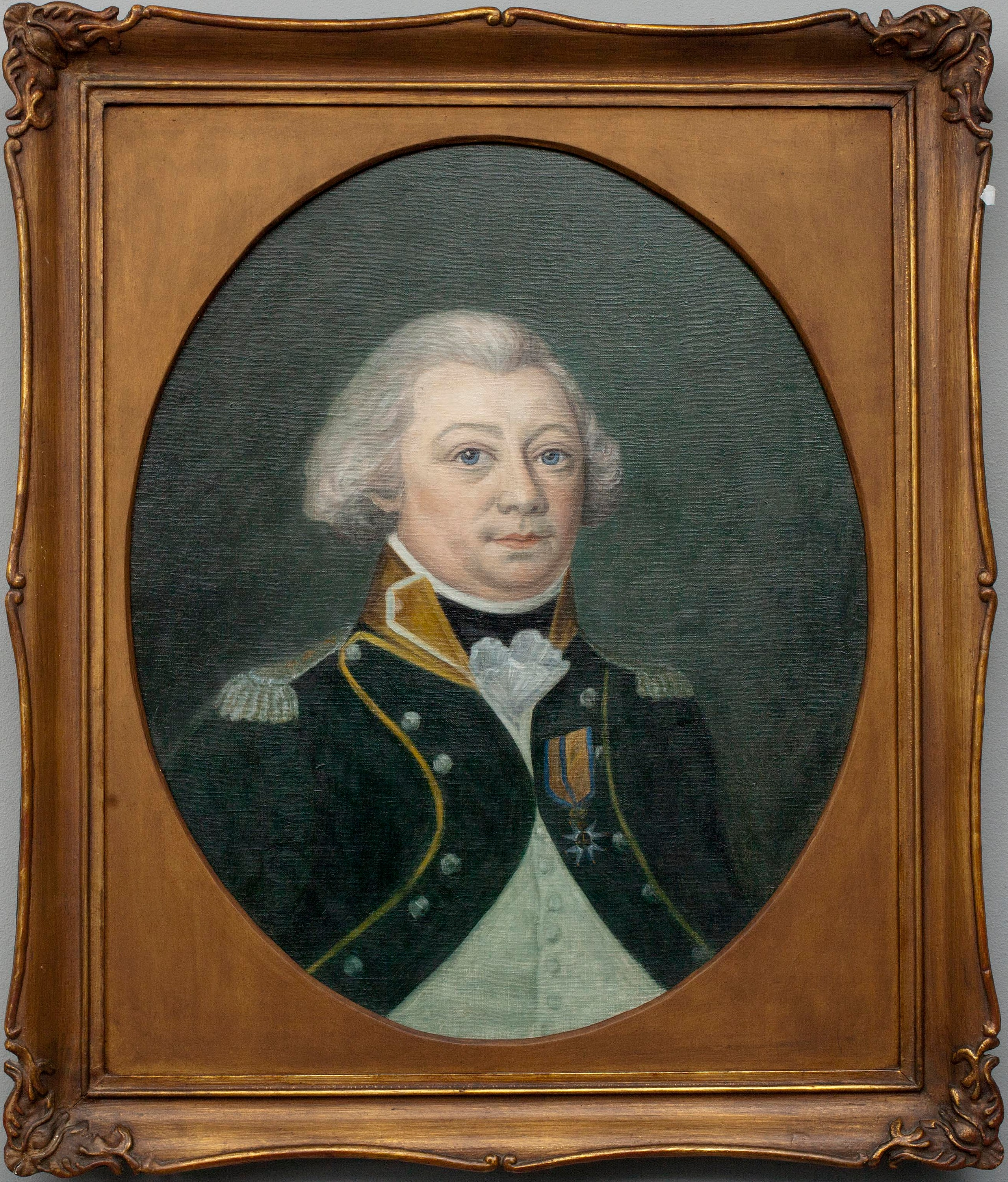 Otto Carl von Fieandt (1758-1825) avporträtterad av Nils Schillmark ca 1795. von Fieandt är iklädd uniform m/1792 för Tavastehus läns regemente, hans axelklaffar visar att han är överstelöjtnant. Han bär Svärdsordens riddartecken på bröstet.